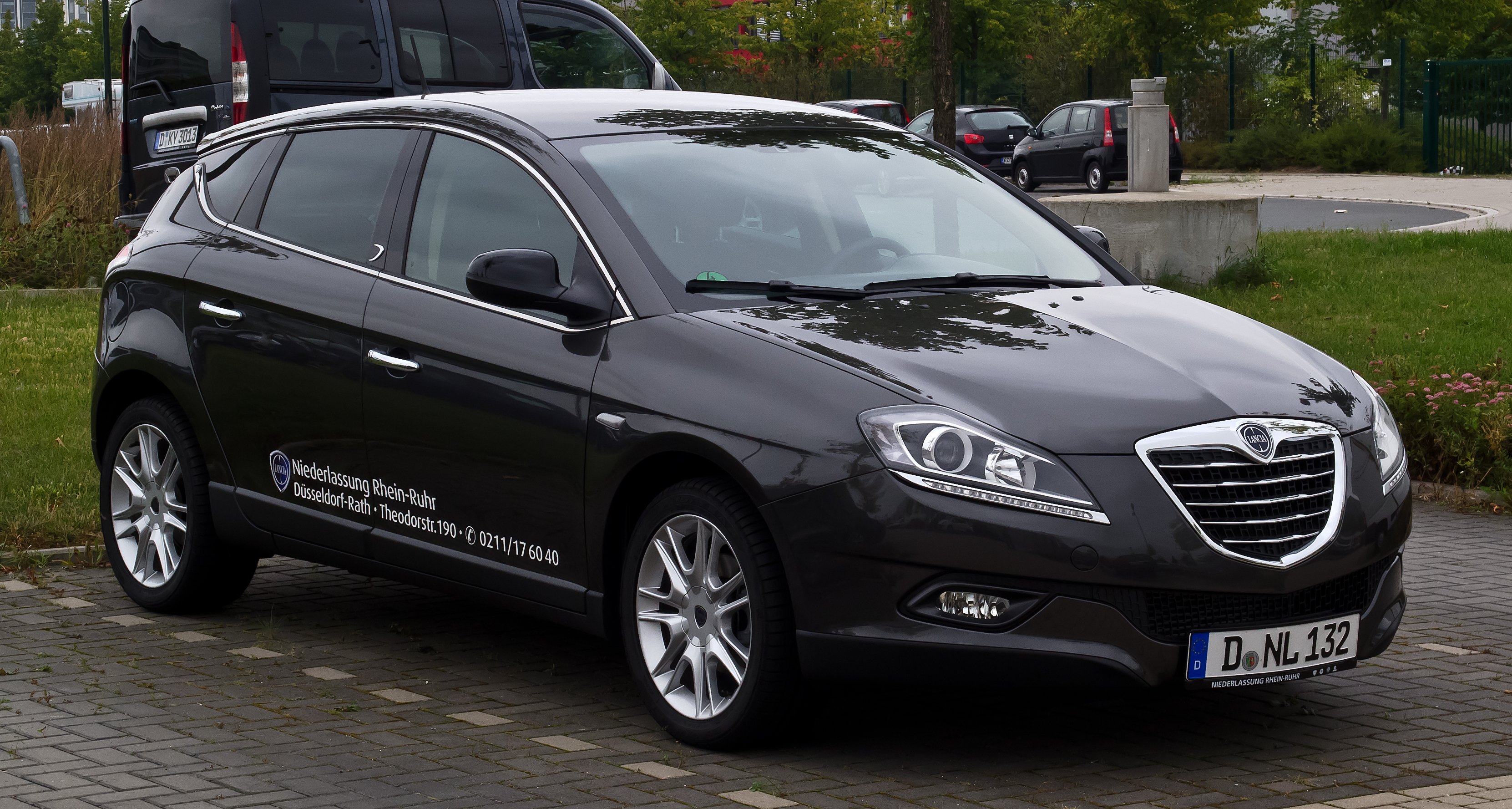 Lancia Delta 1.4 TurboJet 16v Silver (III, Facelift)